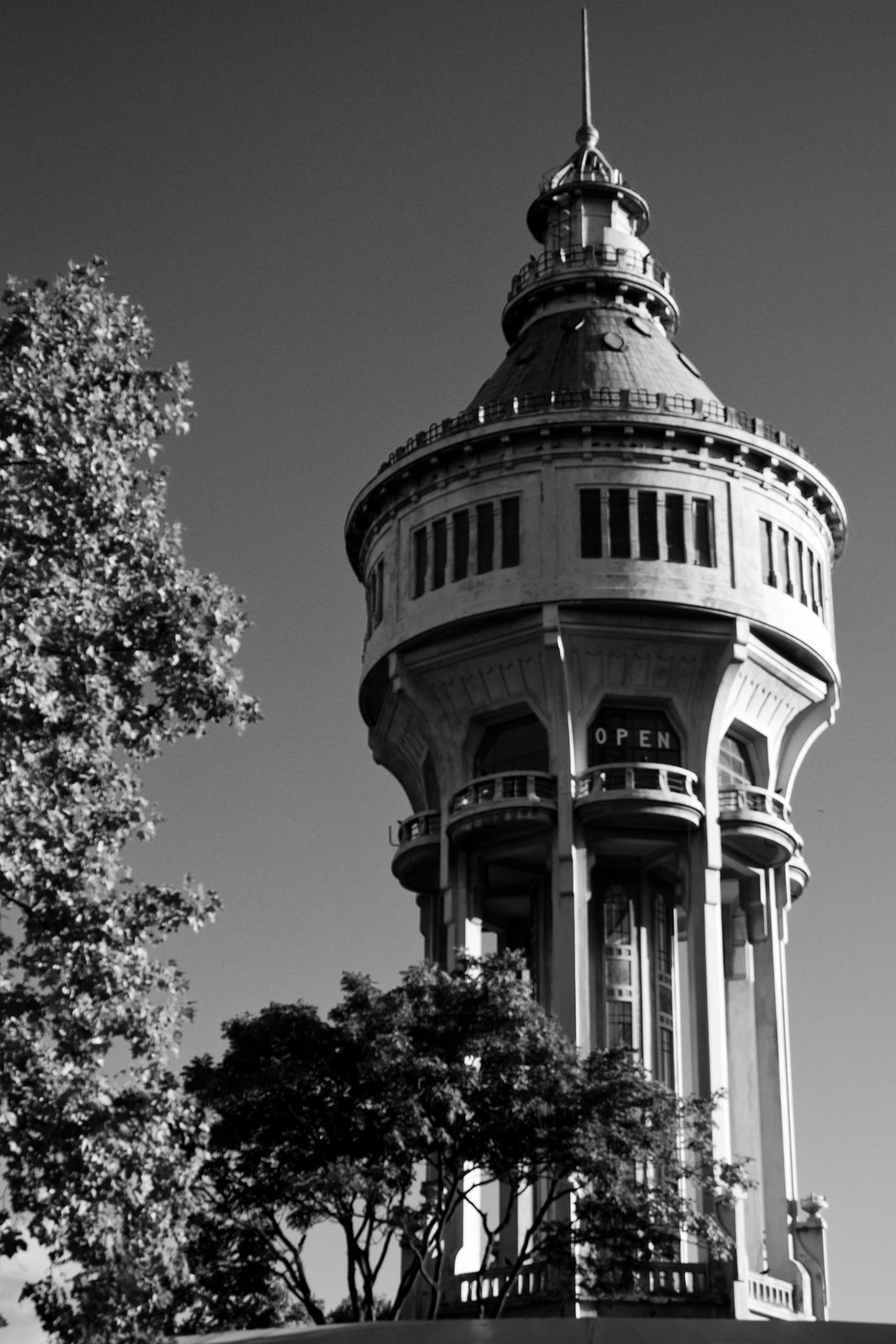 Víztorony (Budapest 13, Margitsziget)